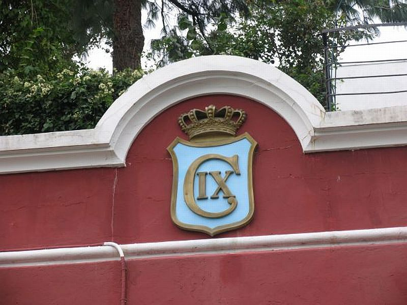 Christiansholms Batteri, monogram